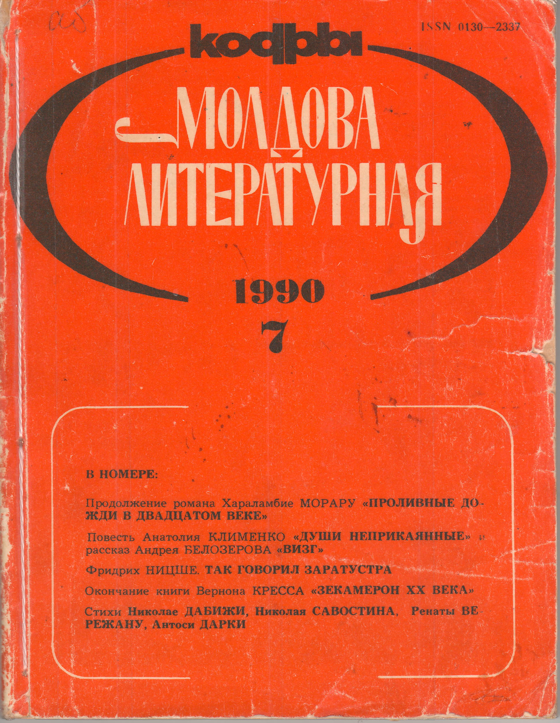 В этом номере опубликован первый рассказ А. Белозёрова "Визг"